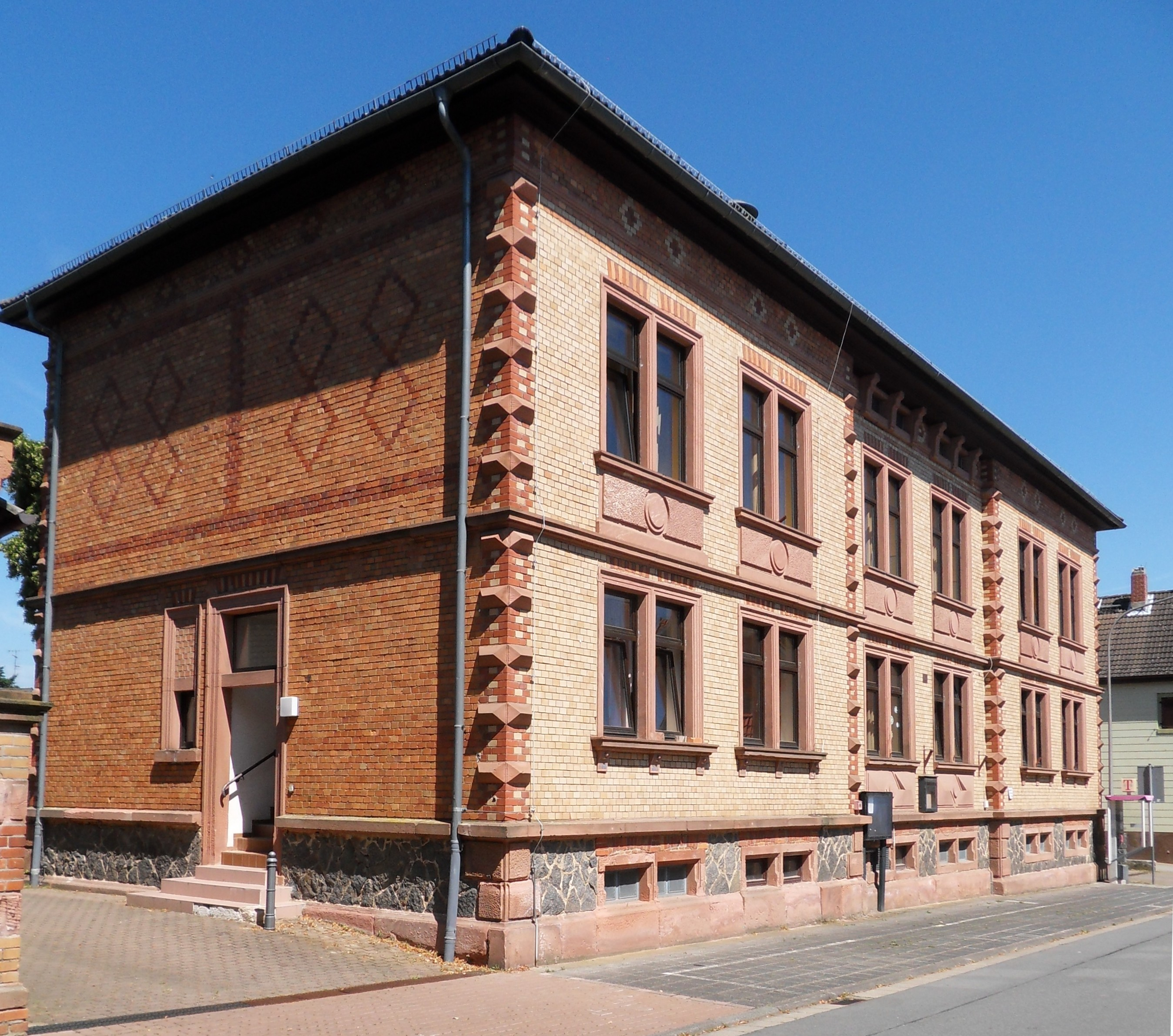 Schulhaus in der Schulstraße 3 in Wersau; ein zweigeschossiger Klinkerbau mit verschiedenen reliefartigen Schmuckelemente zur Fassadengestaltung